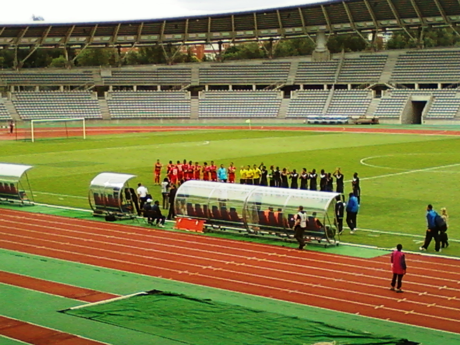 Présentation des équipes lors du match Paris FC - Luzenac du 6 août 2011 au stade Charléty